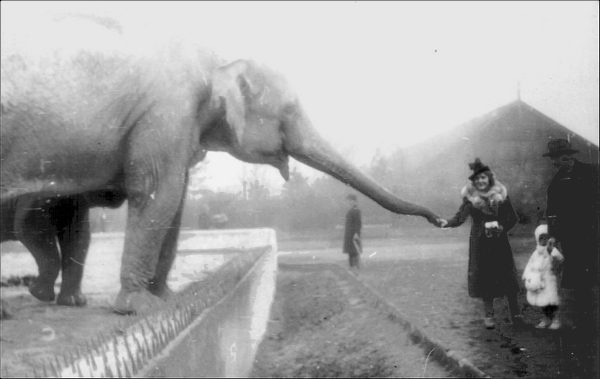 Kasia z Tuzinką, Warszawskie ZOO, 1938; z własnego archiwum zdjęcie udostępnione przez Dixi (c) 2005 na bazie GNU FDL